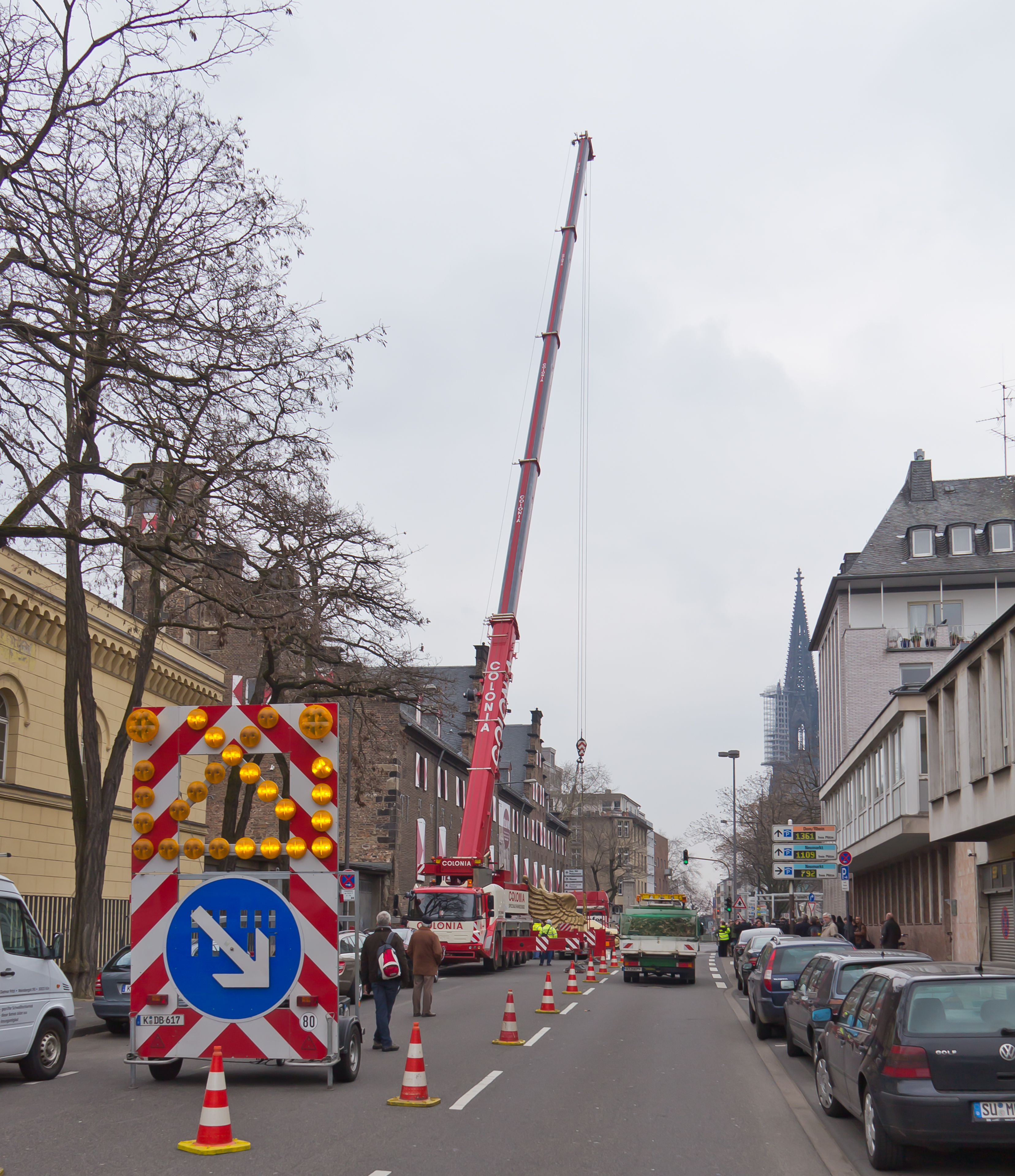 Rückkehr des Flügelautos auf den historischen Treppenturm des Kölnischen Stadtmuseums. Im November 2012 musste das Kunstwerk abgenommen werden, um Mängel an der Betonstandplatte auf dem Turm zu beheben. Auszubildende der Kölner Ford-Werke in Niehl restaurierten zeitgleich das Flügelauto. Bei dieser Generalüberholung lackierten sie den „Vogel“ komplett neu und ersetzten die Haube, die Heckklappe sowie die Radkappen. Foto: Die linke von zwei stadteinwärts führenden Fahrspuren der Straße „Burgmauer“ wurde mit einer Absperrtafel für den Verkehr gesperrt, um eine Aufstellfläche für den Teleskopkran und den Tieflader mit dem Flügelauto zu schaffen.